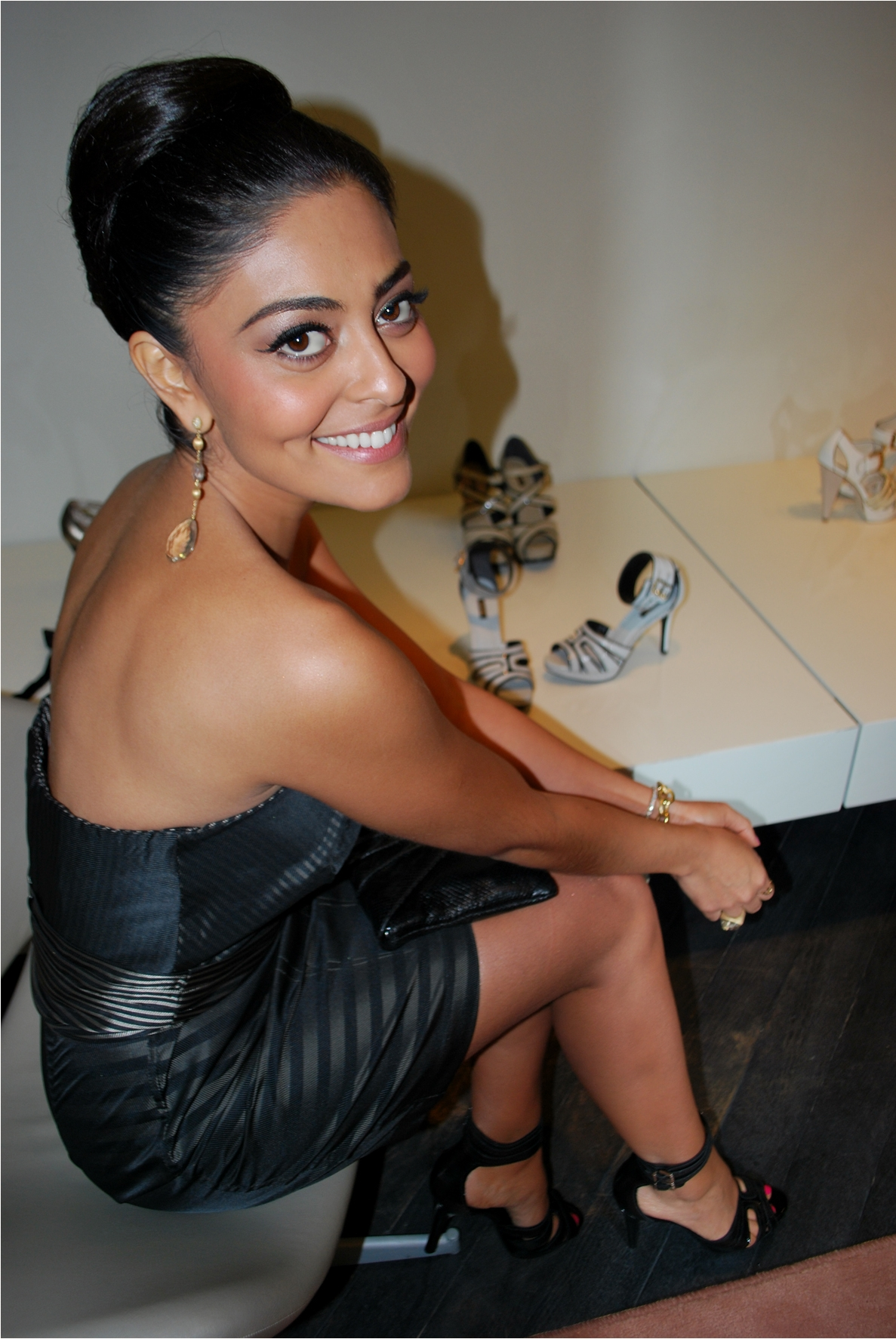 Juliana Paes numa loja da Arezzo